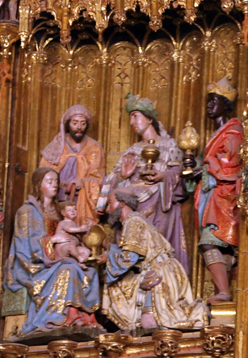 Epifanía, detalle del retablo mayor de la catedralde Toledo (España)